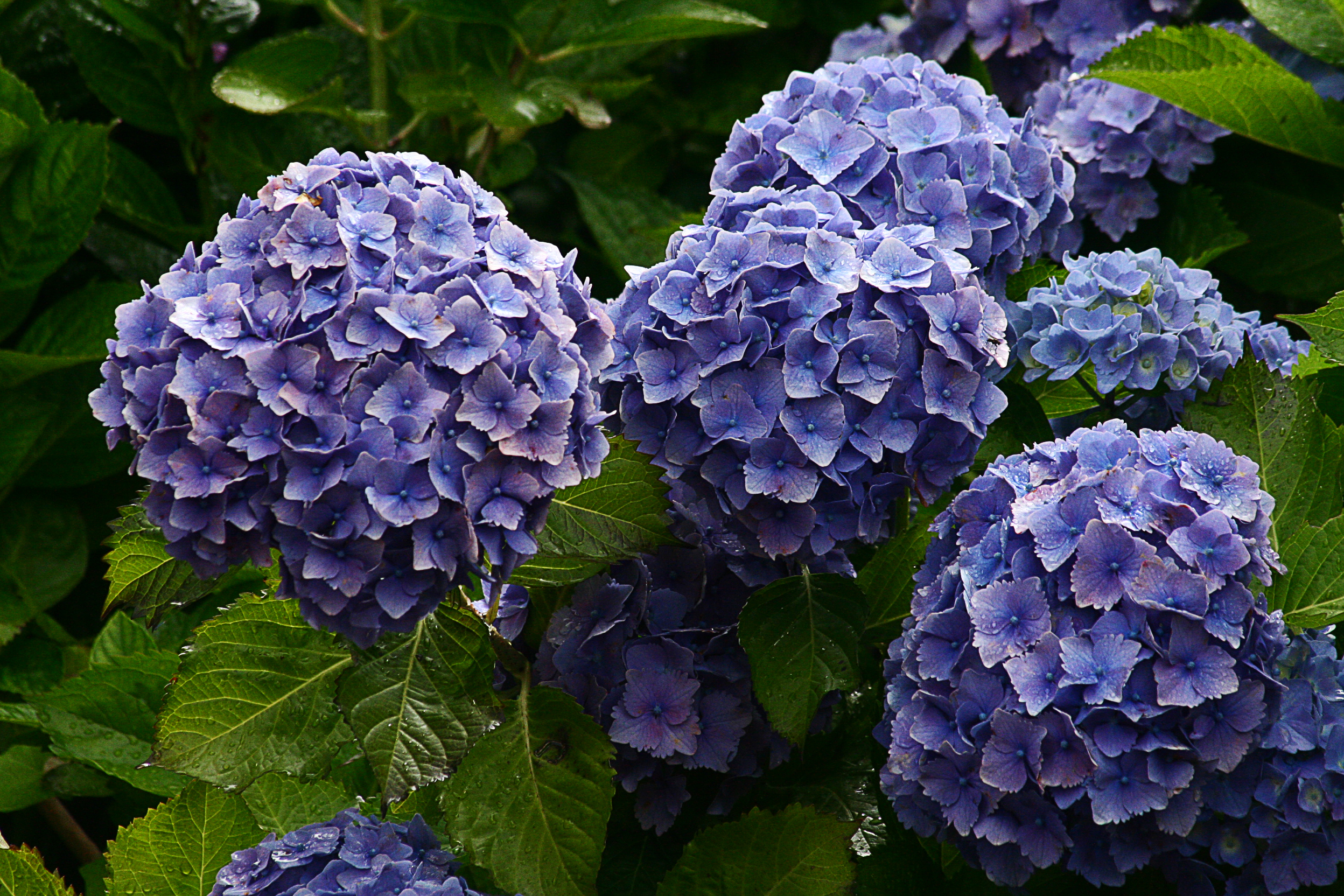 Hortensia bleu en Bretagne